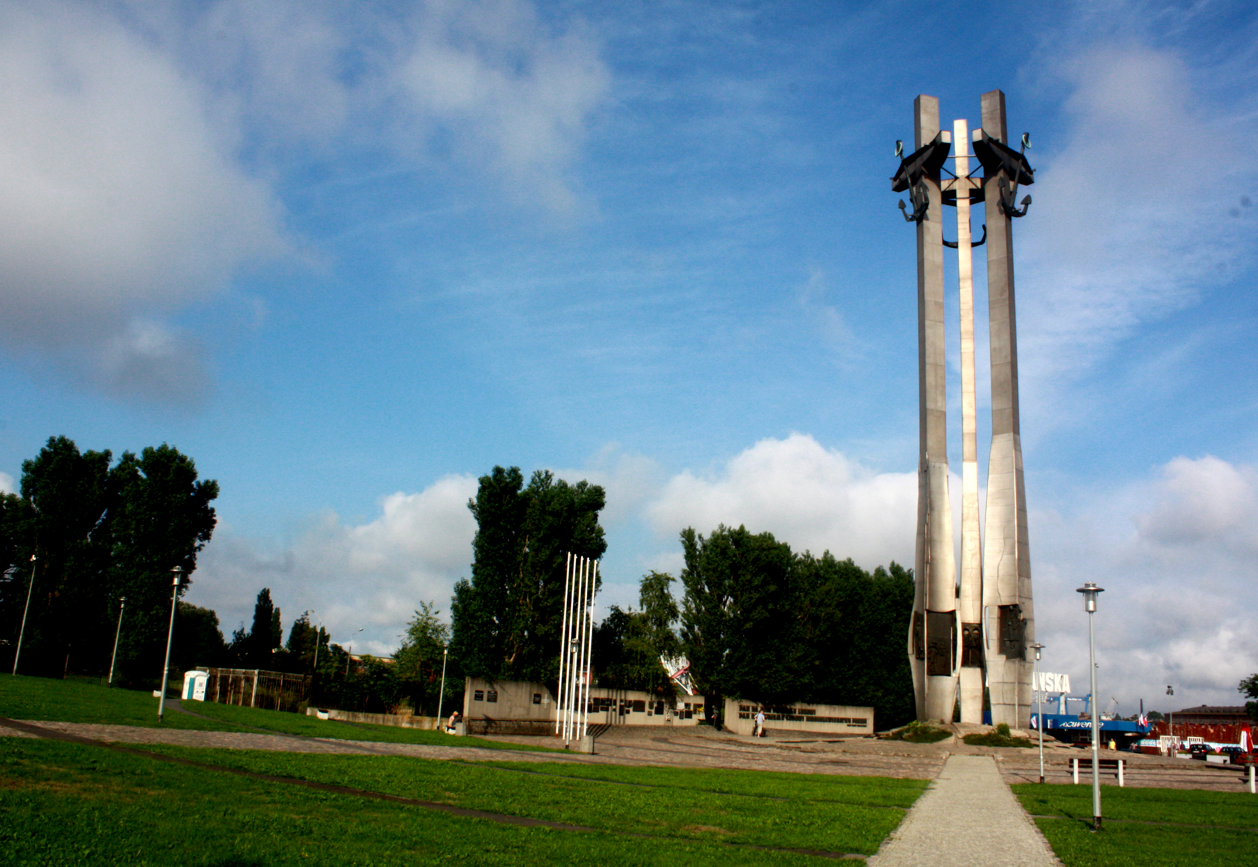 Gdańsk - Pomnik Poległych Stoczniowców Grudnia 1970